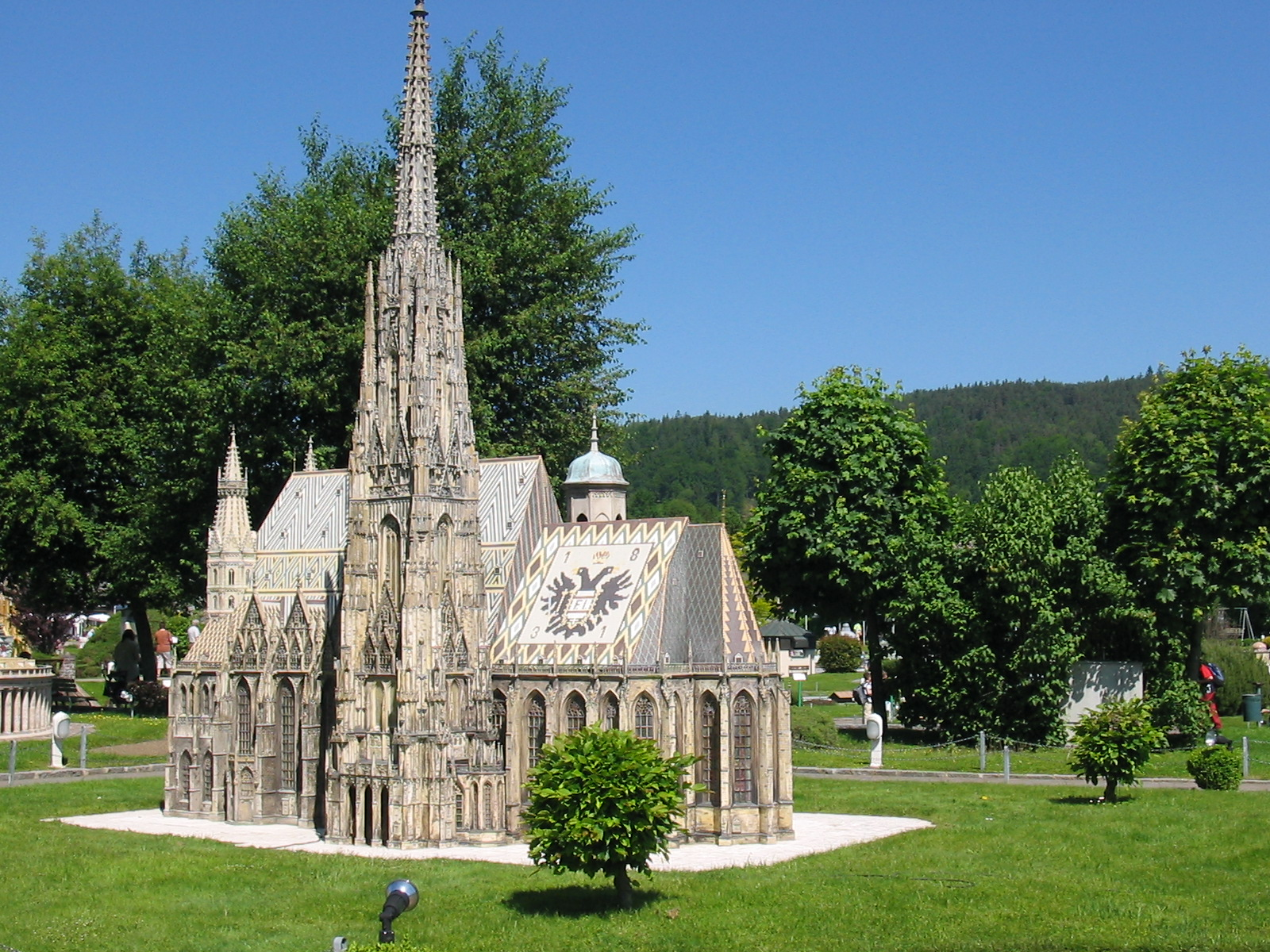 Stephansdom Wien at Minimundus klagenfurt